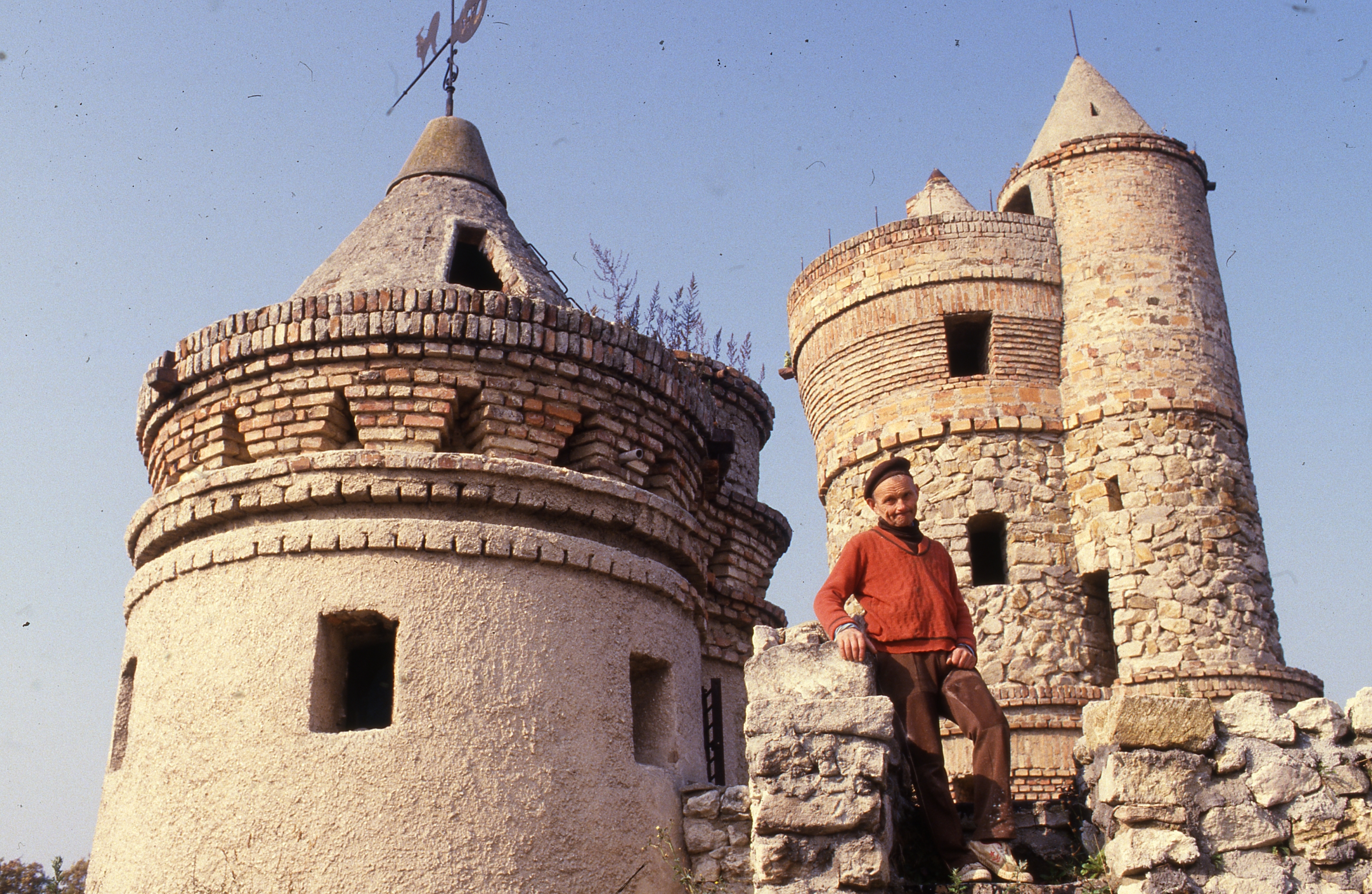 Taródi-vár építőjével, Taródi Istvánnal. Location: Hungary Tags: colorful, castle Title: Taródi-vár építőjével, Taródi Istvánnal.